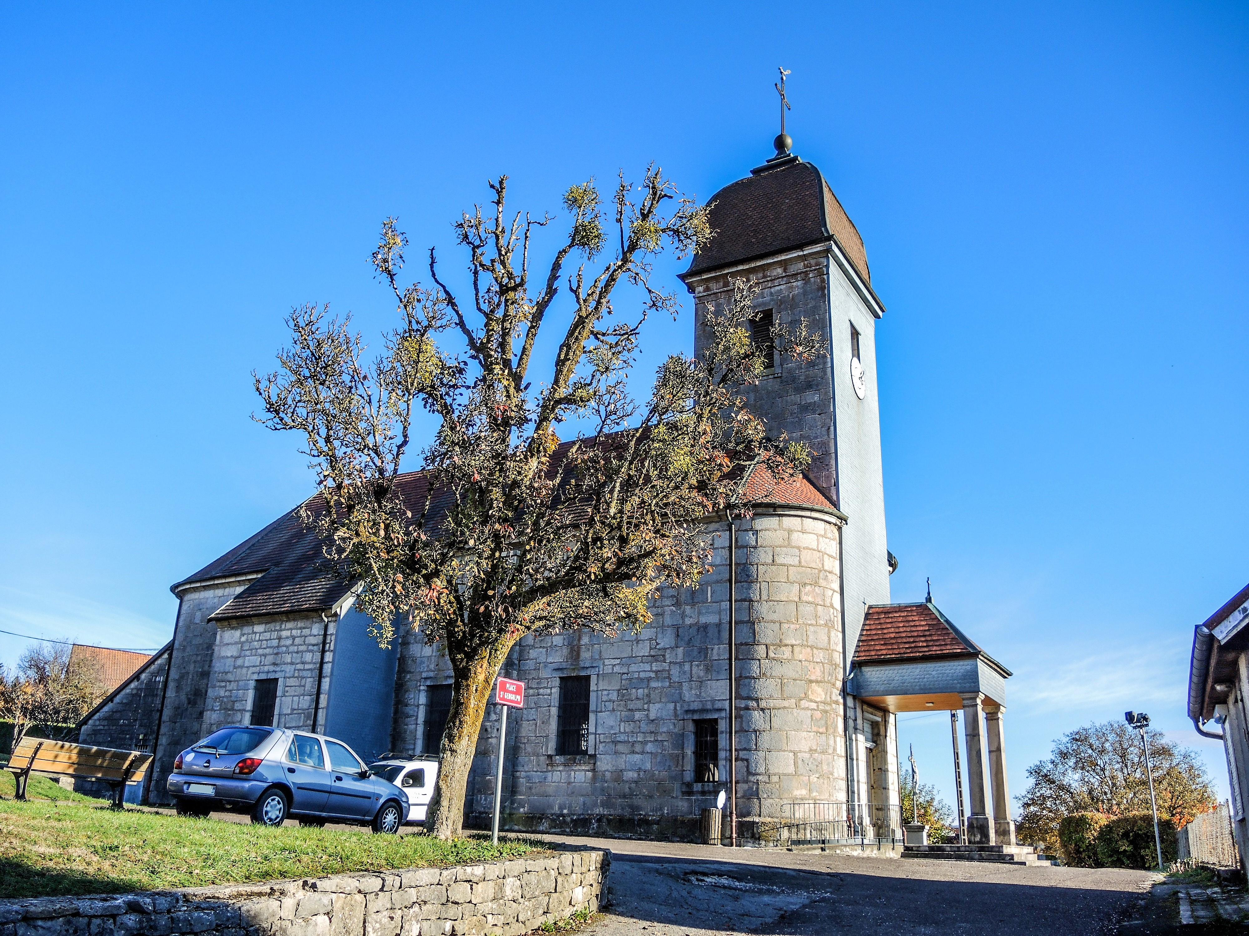 Eglise Saint-Gangulph. Gennes. Doubs